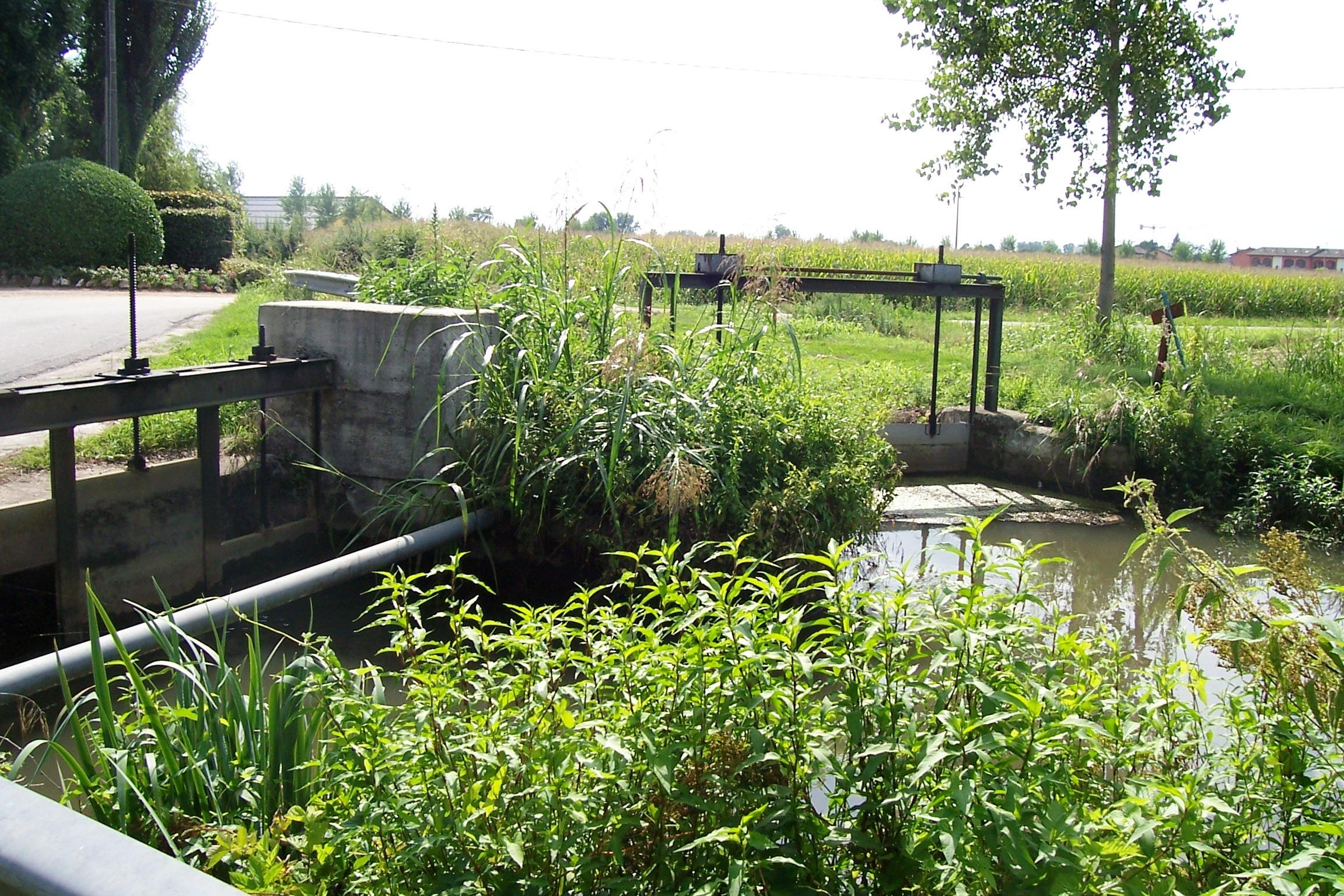 Da questo fontanile escono l'Olonetta (paratoia a destra) e la Misana, presso Misano Olona